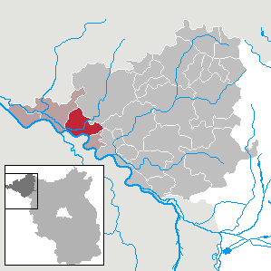 Lanz in Brandenburg (Country) - District Prignitz